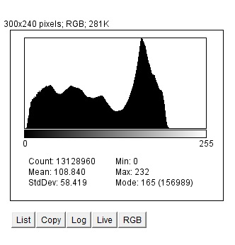 Histograma.